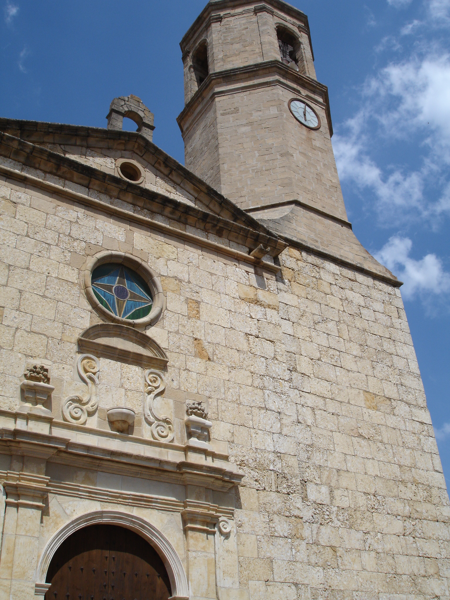 Església de Vilanova de Prades (Conca de Barberà), Catalunya